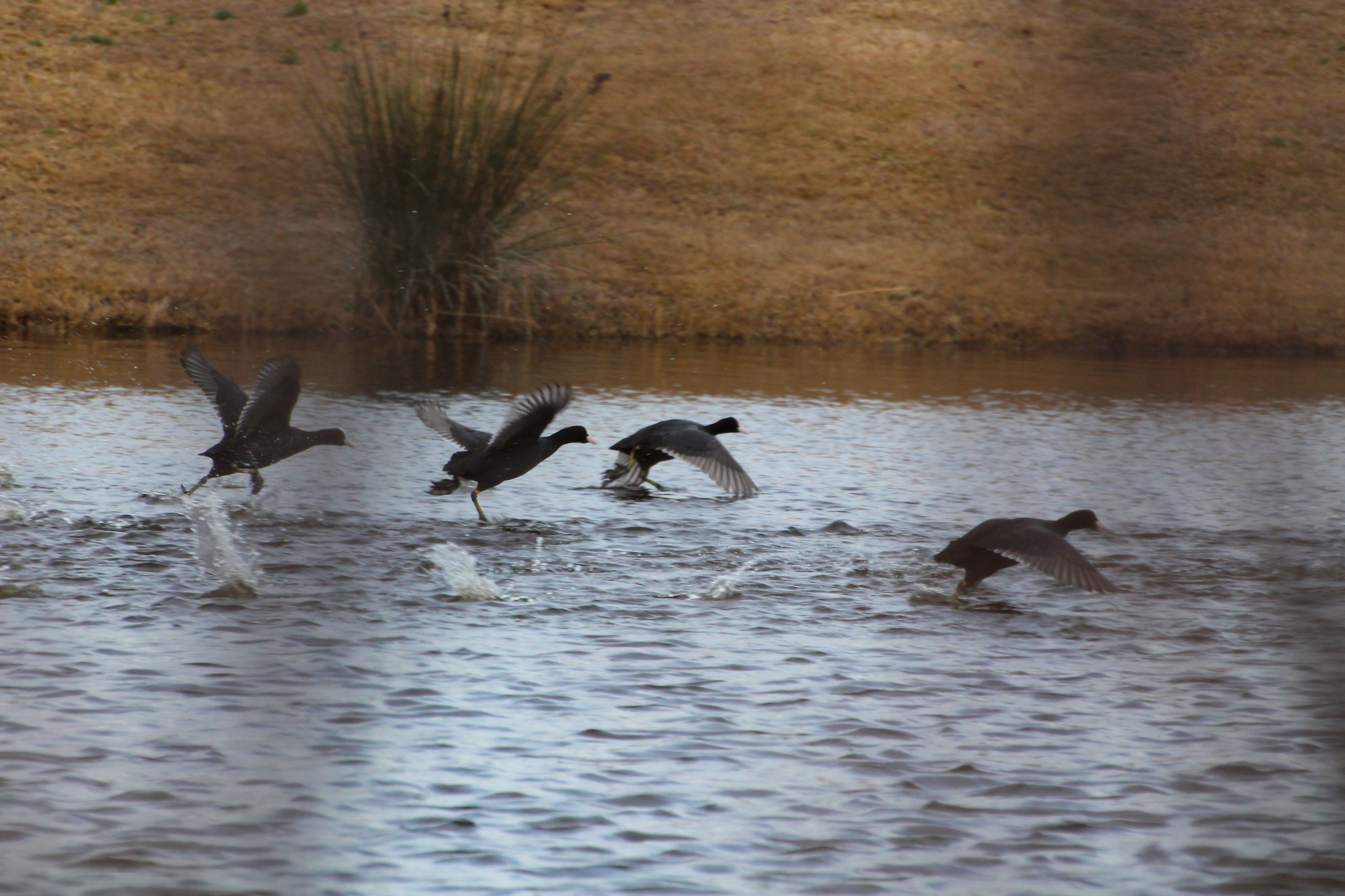 Sèquia Major This is a photography of a Site of Community Importance in Spain with the ID: ES5140004. Natura2000 entry, EEA entry